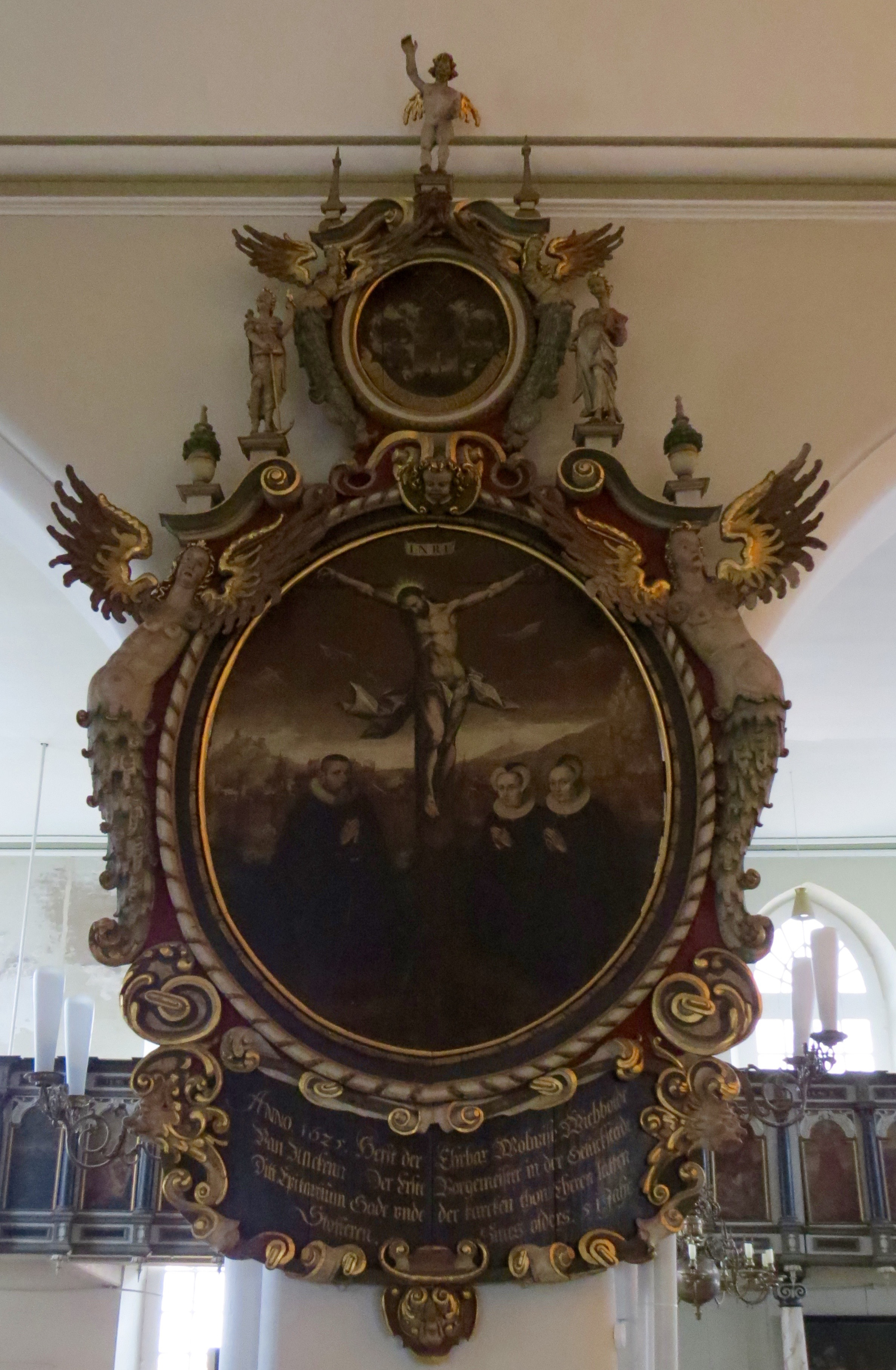 Epitafium over Wichbold (Wibolt) von Ancken, den første borgmester i Glückstadt, med sin første afdøde kone og hans anden kone. Glückstadt Kirke.